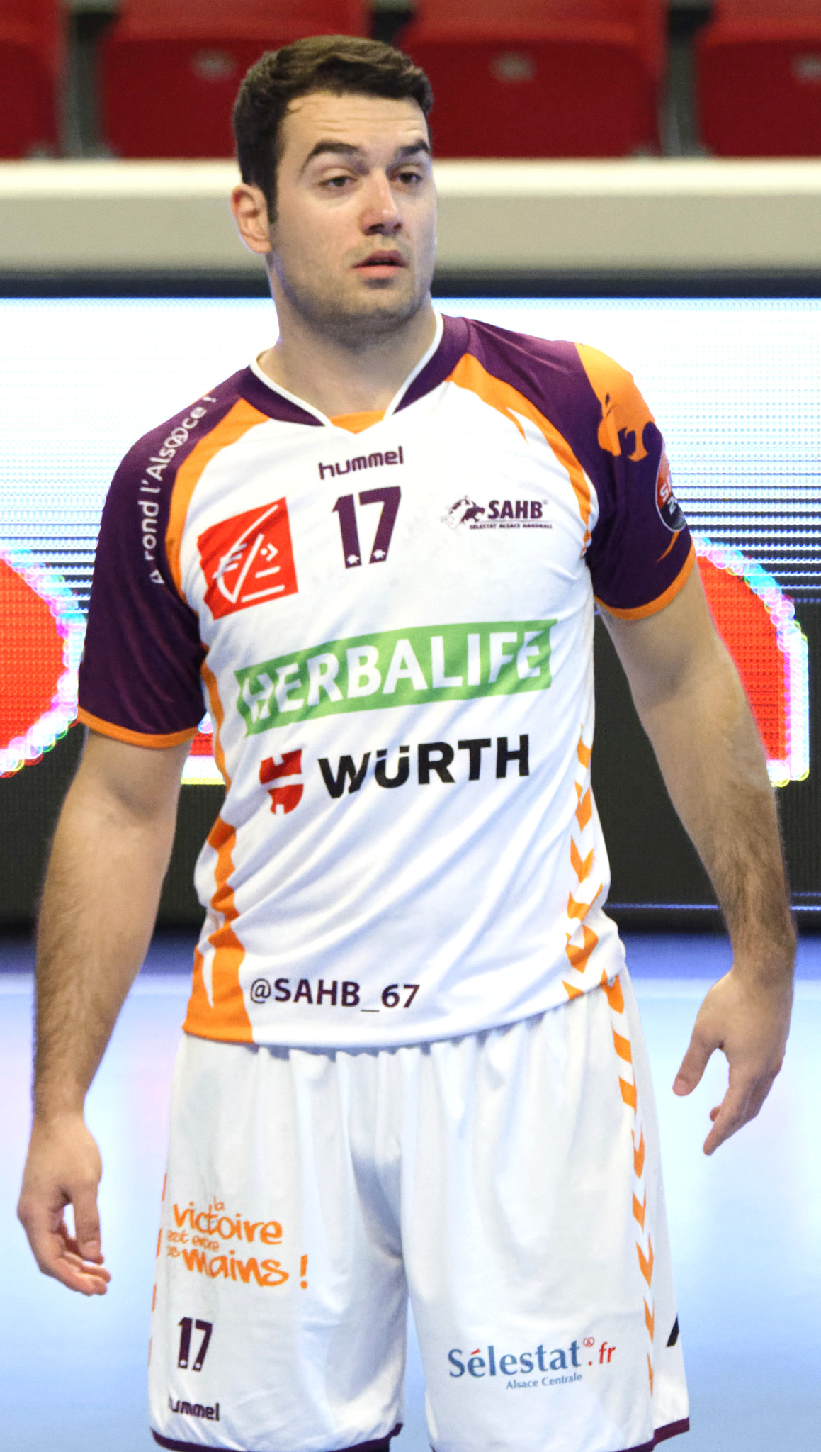 Rencontre de la 20e journée de LNh entre le PSG Handball et Sélestat. A Coubertin, le 08 avril 2015.